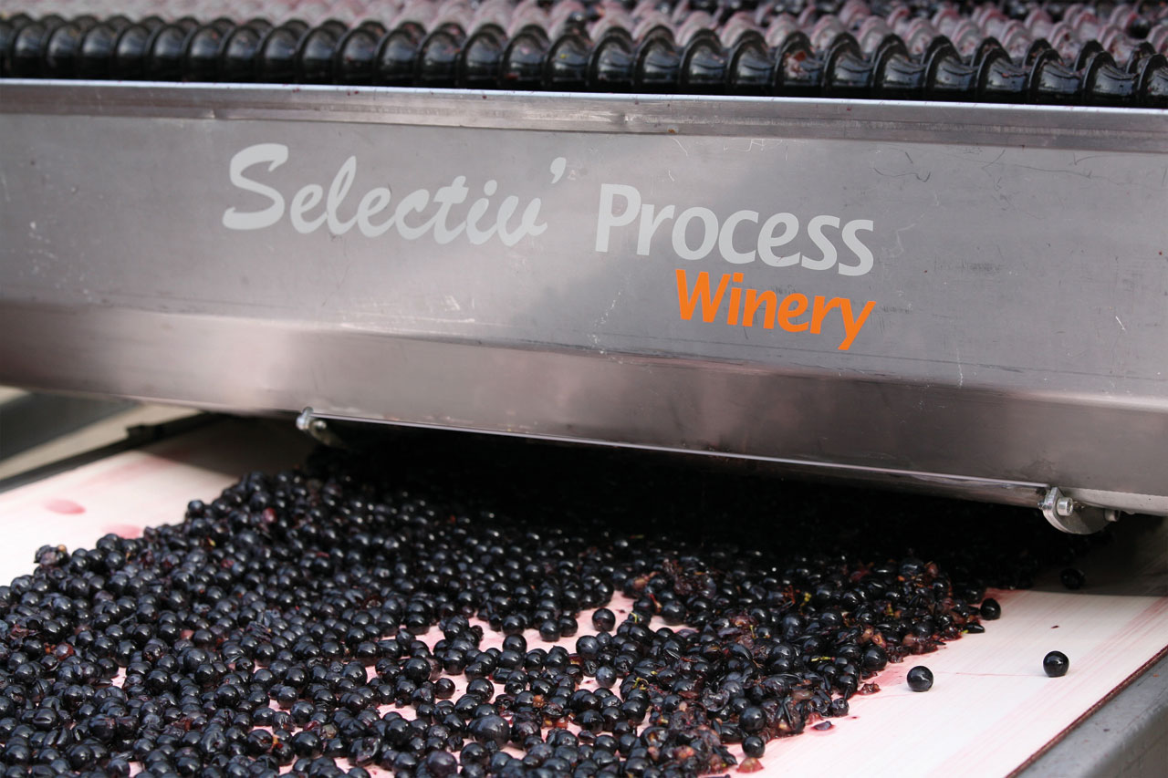 Outil d'egrenage et de tri Pellenc Selectiv Process Winery